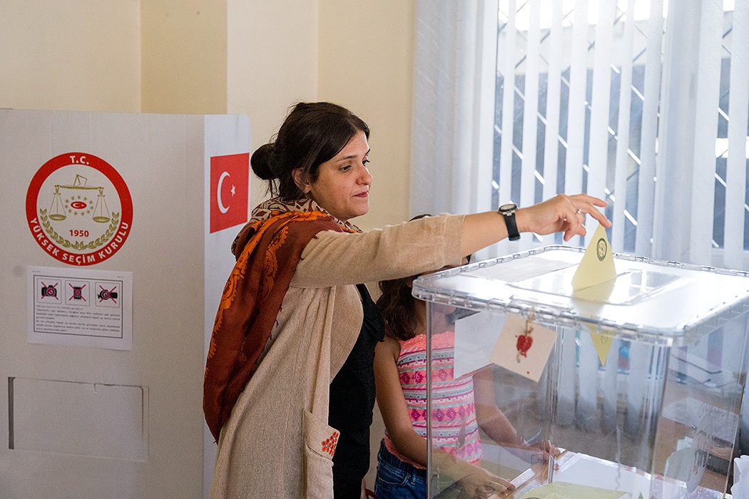 انتخابات ریاست جمهوری و پارلمانی ترکیه صبح يکشنبه ۲۷ خرداد ۱۳۹۷ با حضور رضا هاکان تکین سفیر ترکیه در تهران در محل سفارت ترکیه در تهران و سرکنسولگری‌های این کشور در ارومیه و تبریز برگزار شد.